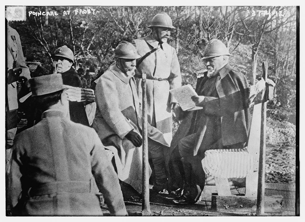 Raymond Poincaré au front